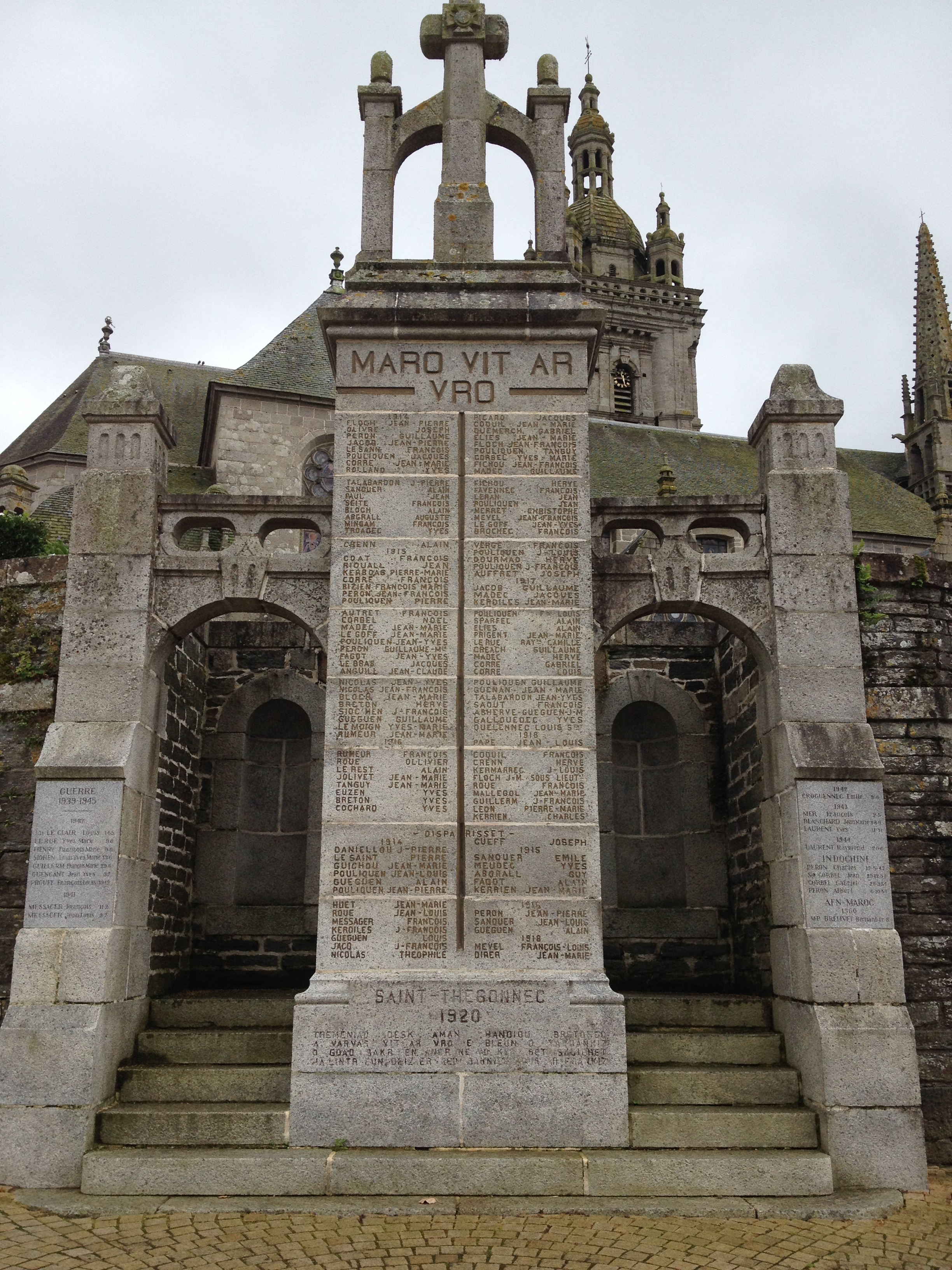 monumant Sant Tegoneg